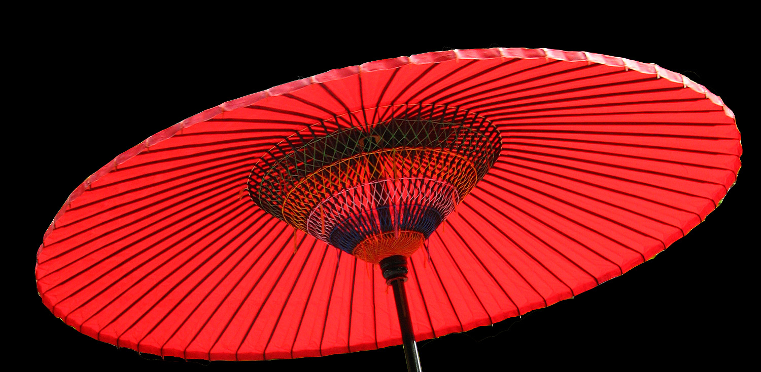 Karakasa (parasol) in Japan